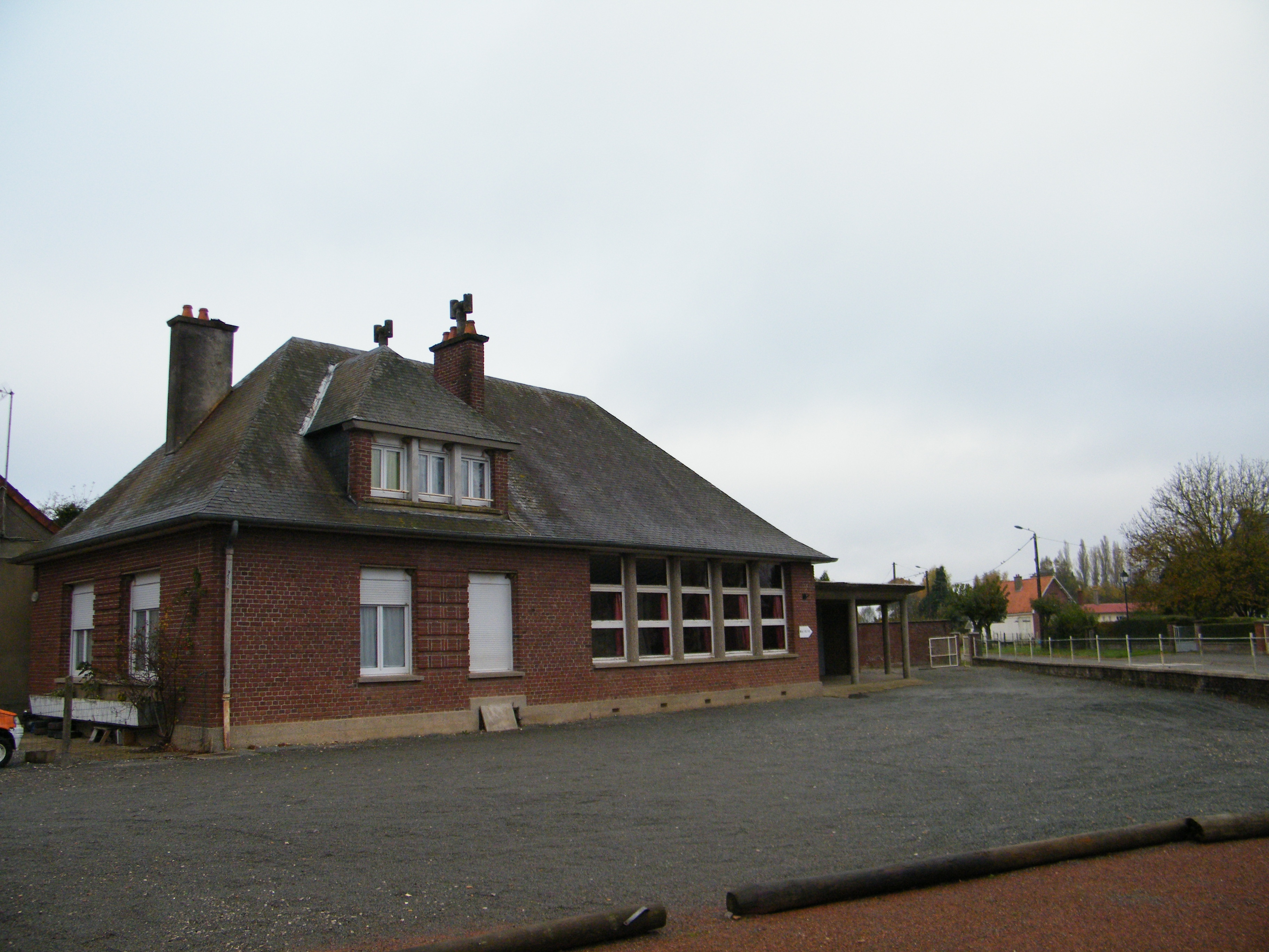 Ligescourt, Somme, Fr, mairie